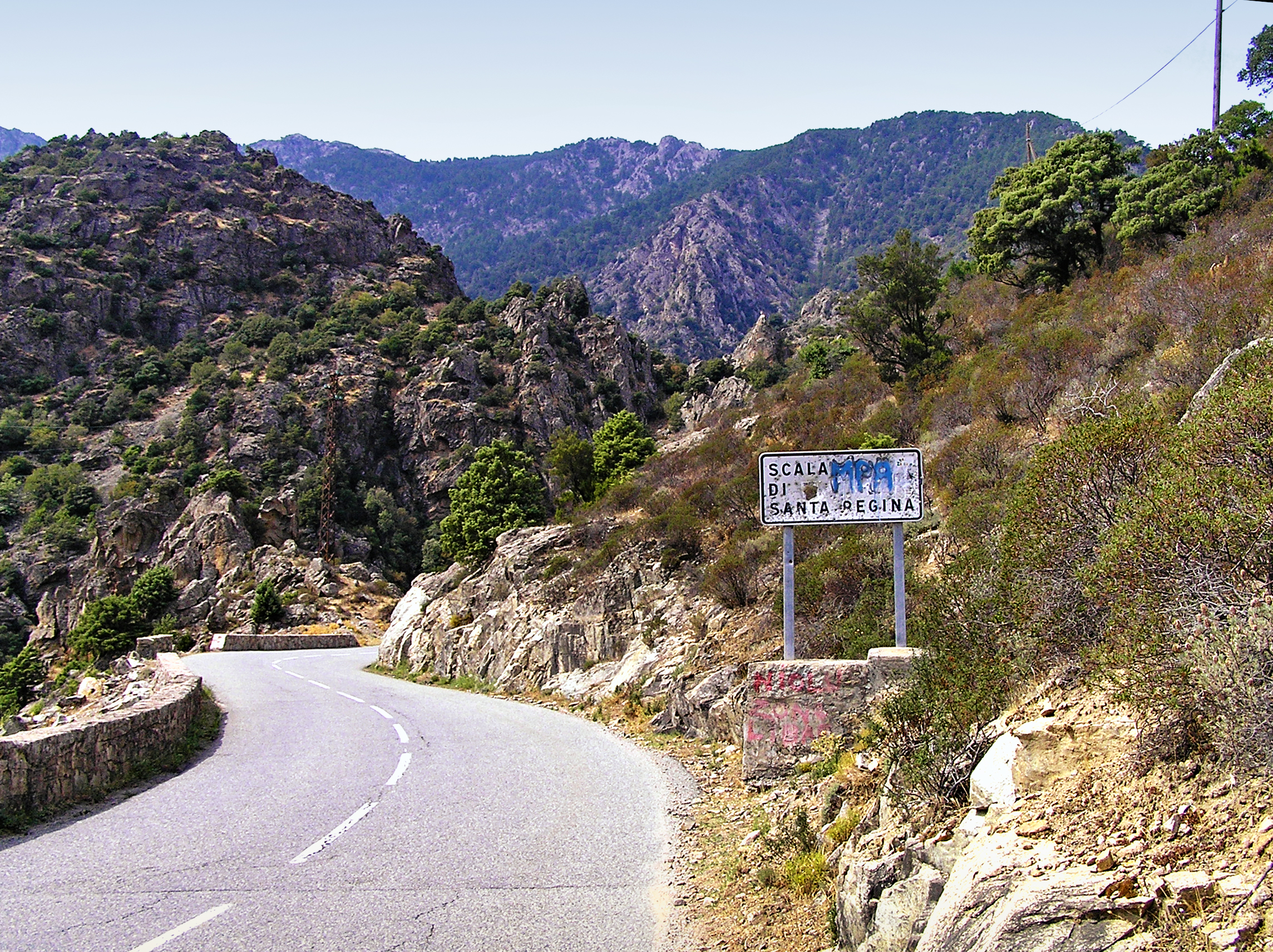 Corscia (Corsica) - Panneau du défilé sur la D84